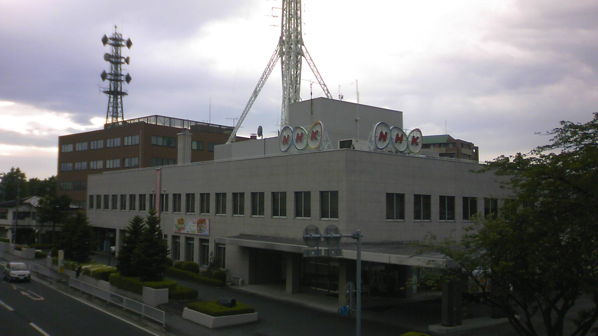 NHK盛岡放送局